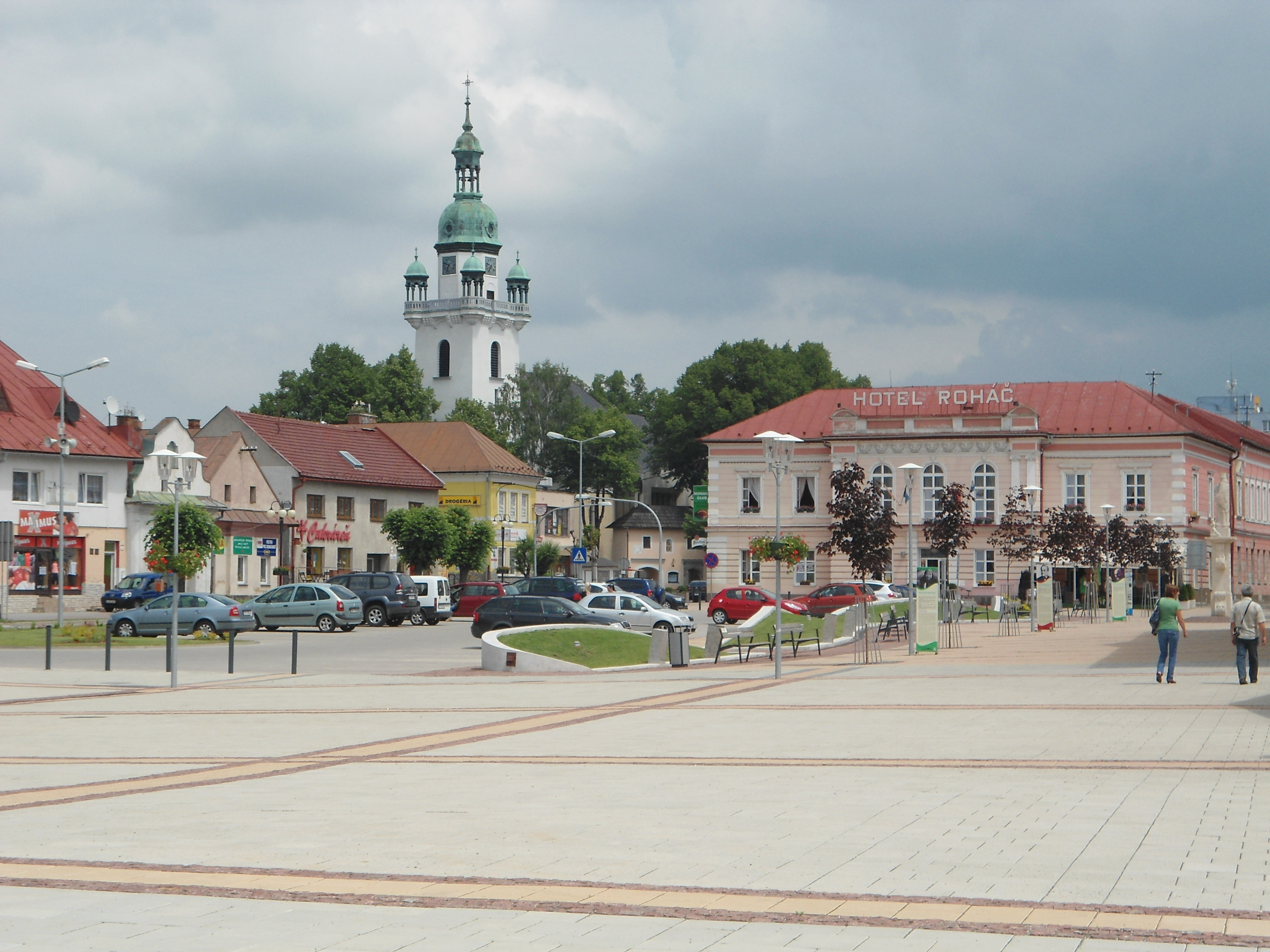 Plaza del Ayuntamiento de Trstená.